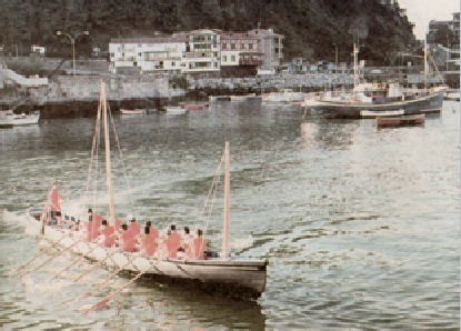 Ameriketatik (reproduction d’une trainière traditionnelle) arrivant au port de Mutriku (1998).